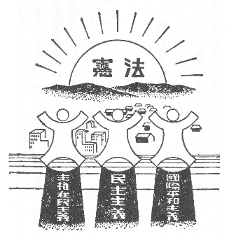 太平洋戦争終結後に短期間使用された中学校1年生用社会科の教科書『あたらしい憲法のはなし』での、日本国憲法の三原則を表した挿し絵。